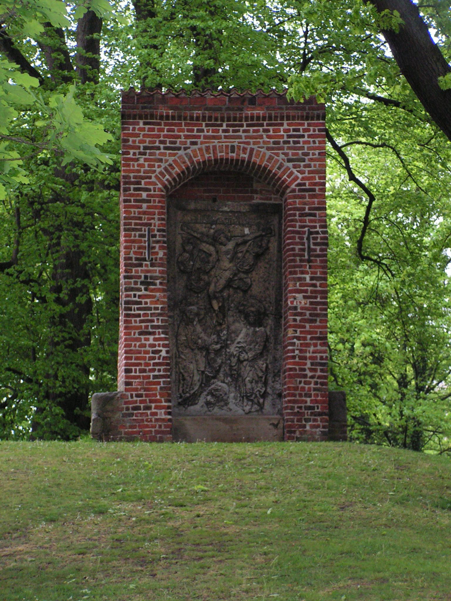 Lübeck St.Gertrud/Jerusalemsberg/Ende des Kreuzweges